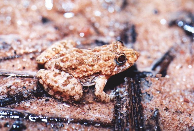 Pseudopaludicola ternetzi